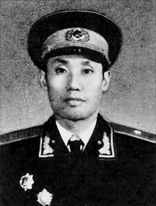 李耀文1955年被授予少将军衔